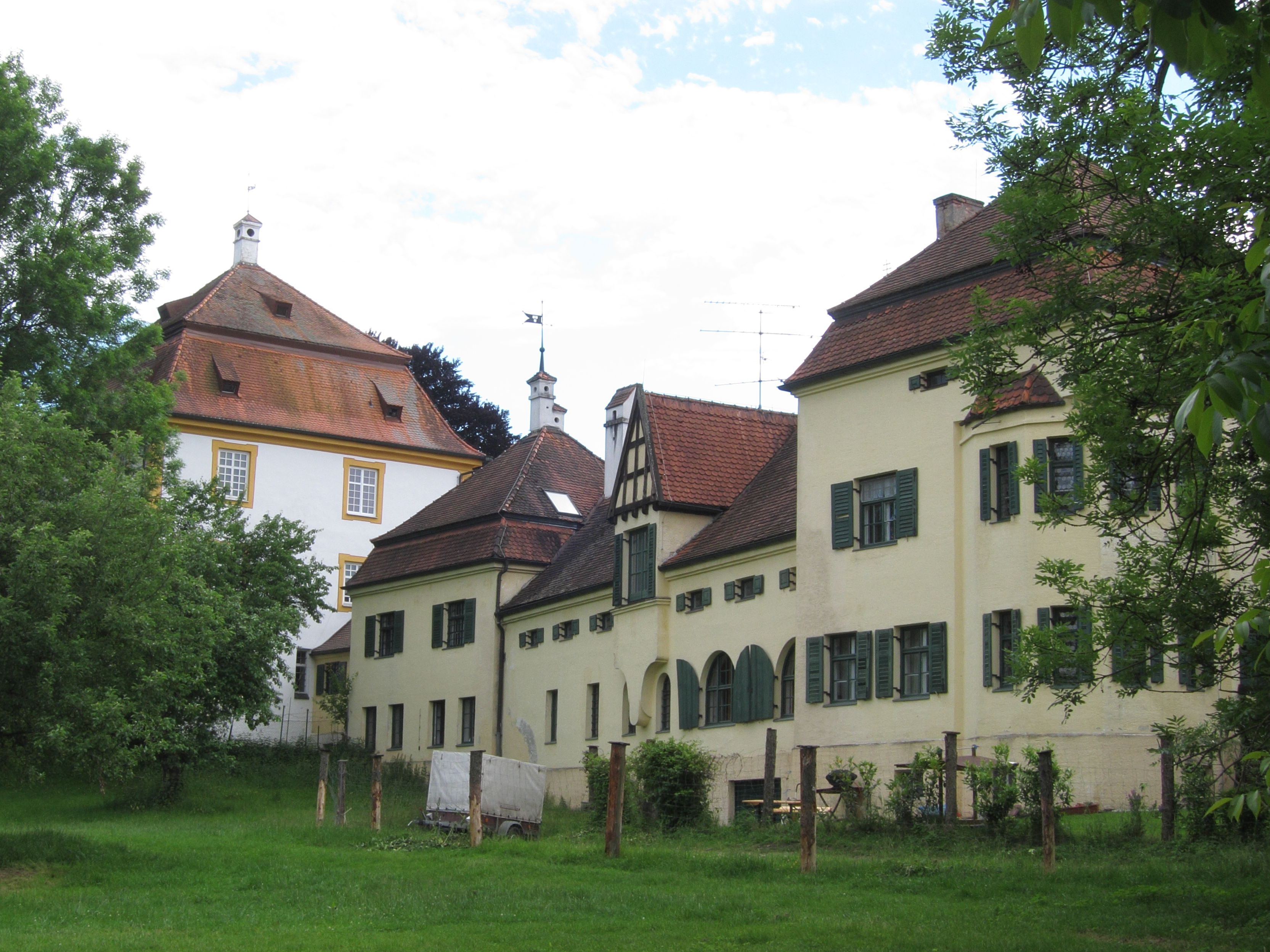 Schloss Aufhausen, dreigeschossiger kubischer Schlossbau mit Mansardwalmdach, im Kern Anfang 18. Jahrhundert, mit Ausstattung; Schlosskapelle St. Magdalena, mit Walmdach und Dachreiter, 1720, von Johann Baptist Lethner 1760 überarbeitet; Wirtschaftsgebäude, Vierseitanlage mit unterschiedlichen Geschoßhöhen und Dachformen, Ende 19. Jahrhundert; Kegelbahn, bez. 1897; mit Ausstattung.